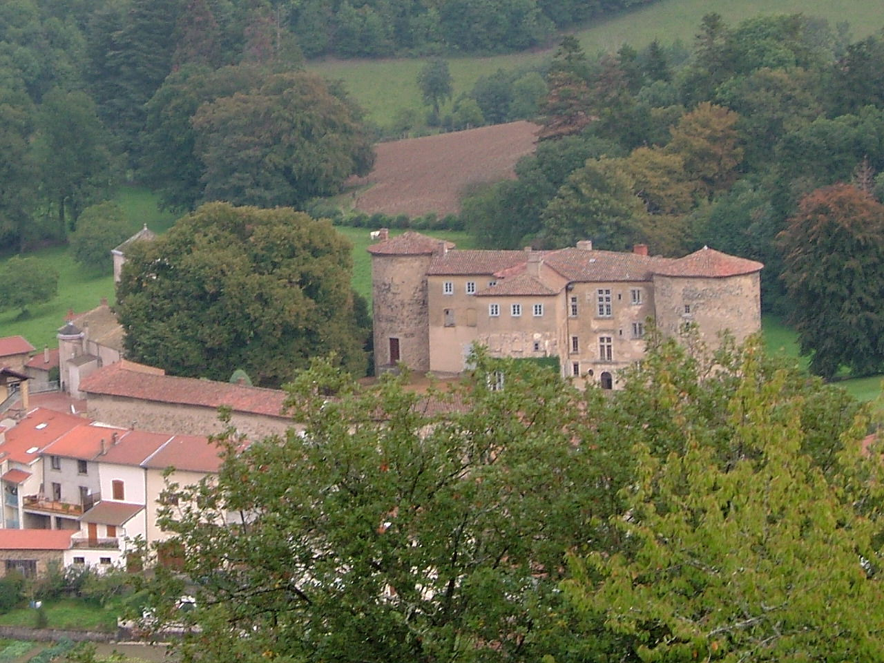 Chateau de Joux et son Tilleul